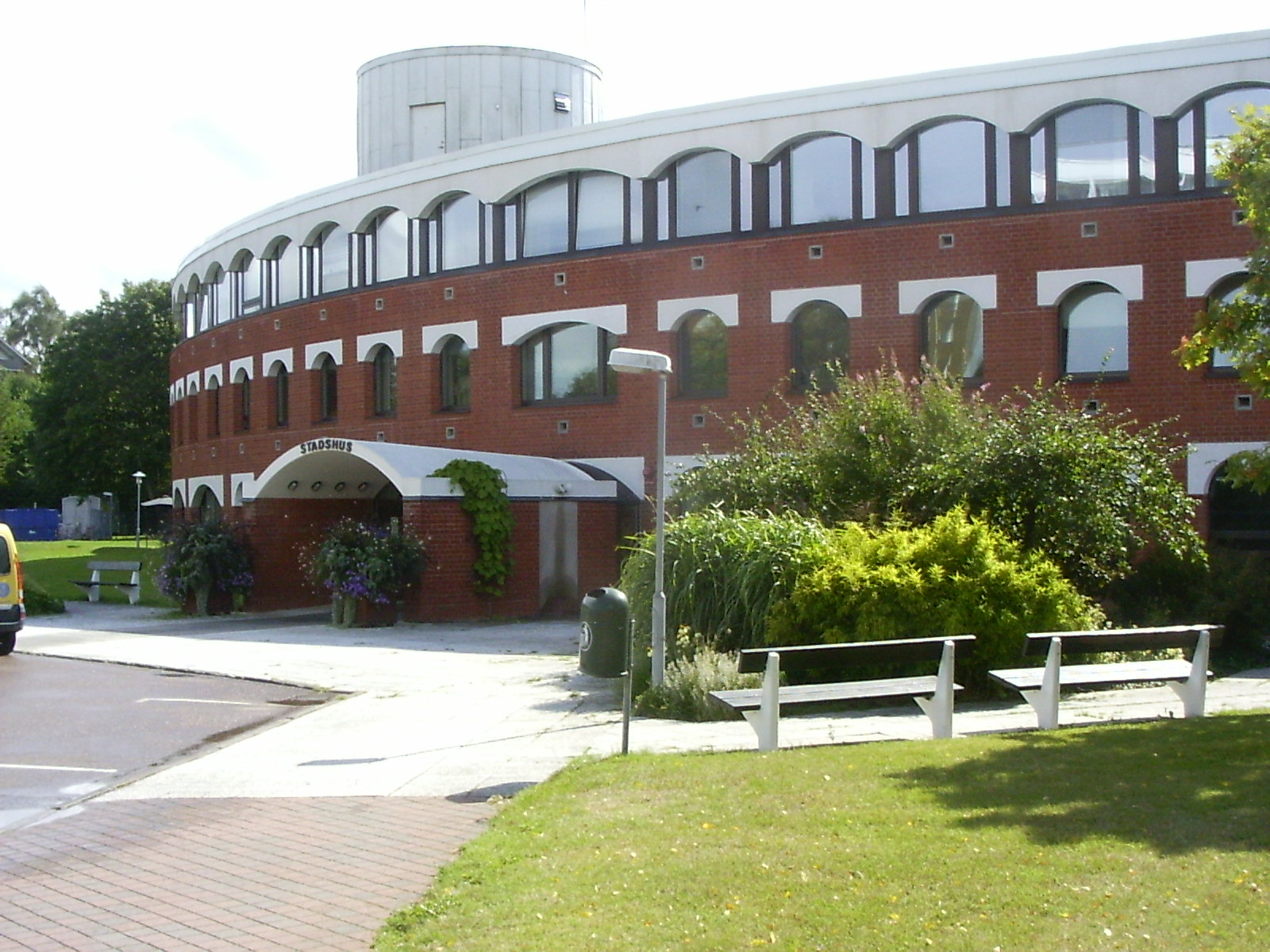 Ängelholm, nieuwe raadhuis